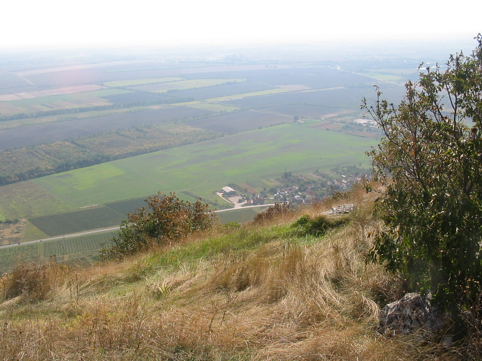 Panorama from the Szársomlyó (part of the Villány Mountains) Kilátás a Szársomlyóról (a Villányi-hegység része) dél felé